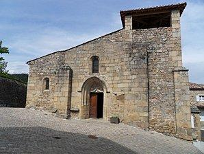 L'église St JEAN L'EVANGELISTE